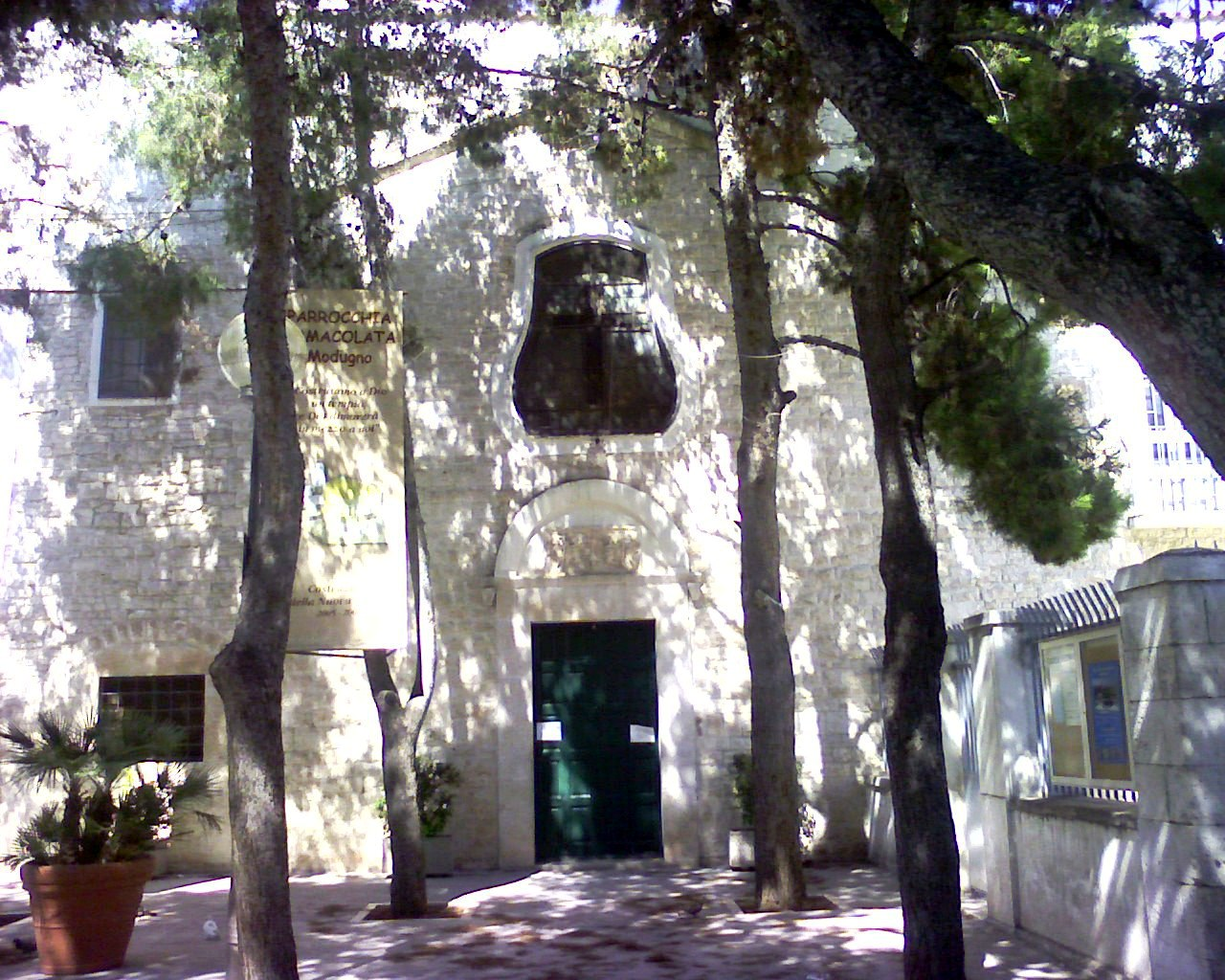 chiesa dell'immacolata-Modugno (Bari) - Italy